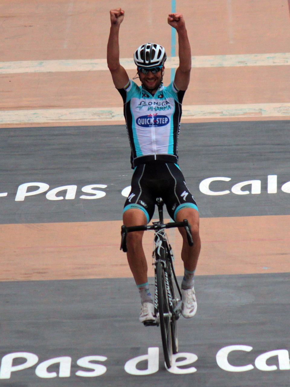 Tommeke Wins - Tom Boonen